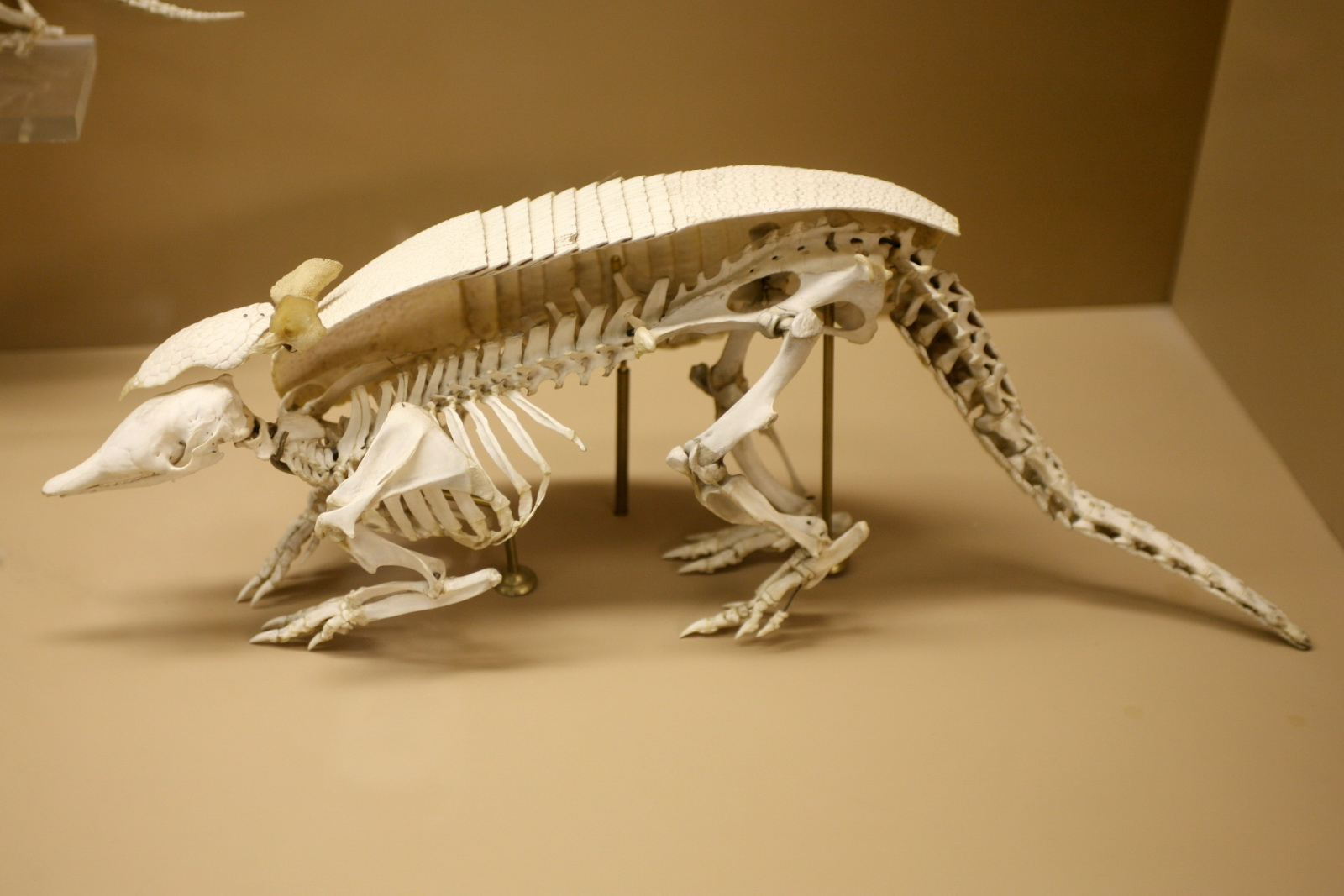 Dasypus skeleton